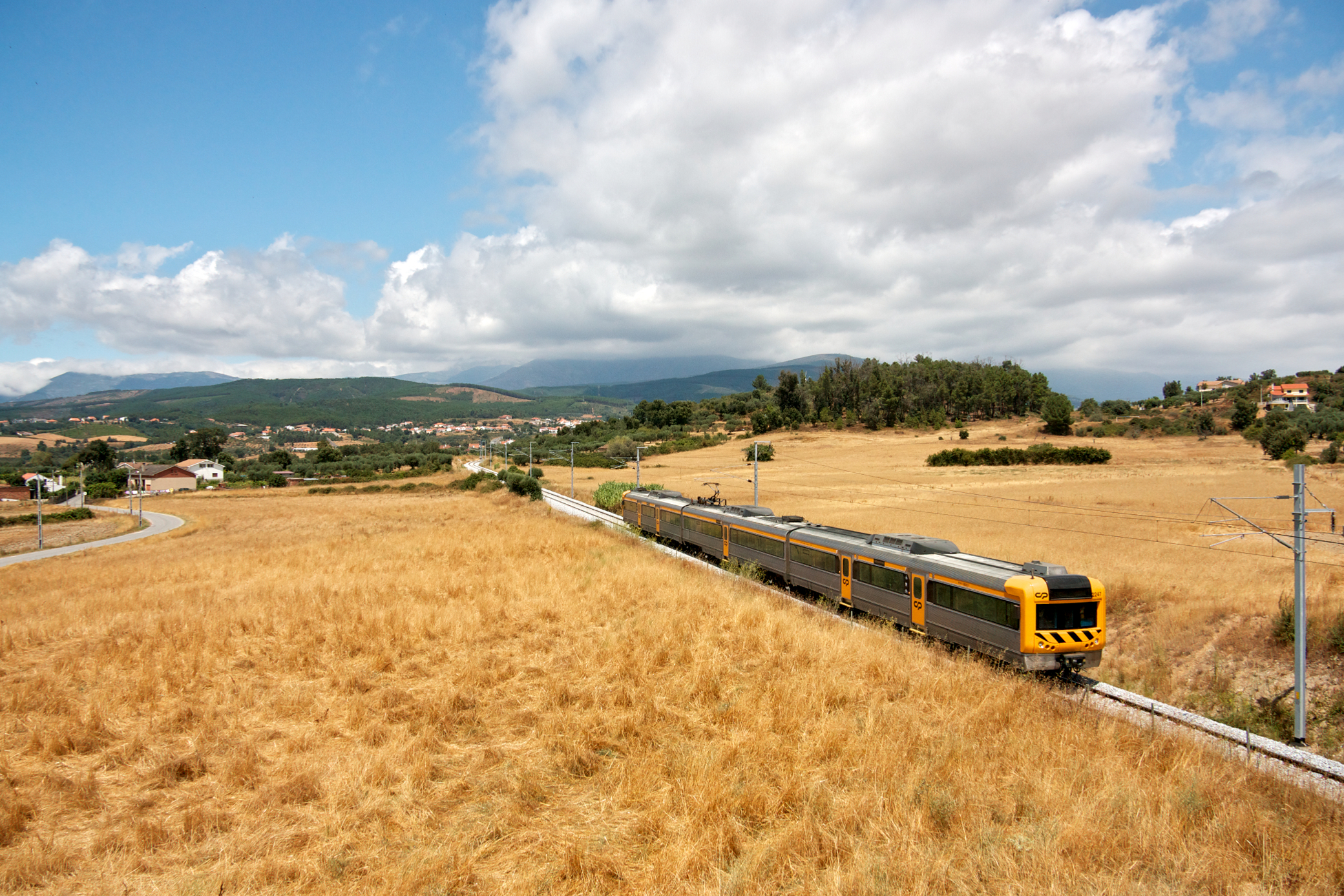 Tipo: Comboio Regional 5674 [Covilhã - Castelo Branco] Local: Alcaria [Linha da Beira Baixa, PK 154] Data e hora: 2 de Agosto de 2011 [13h18] Material: Automotora 2247 [Unidade Tripla Eléctrica] esta fotografia foi publicada no . [ENG] CP 2247 with a Regional train to Castelo Branco, in a recently electrificated line.